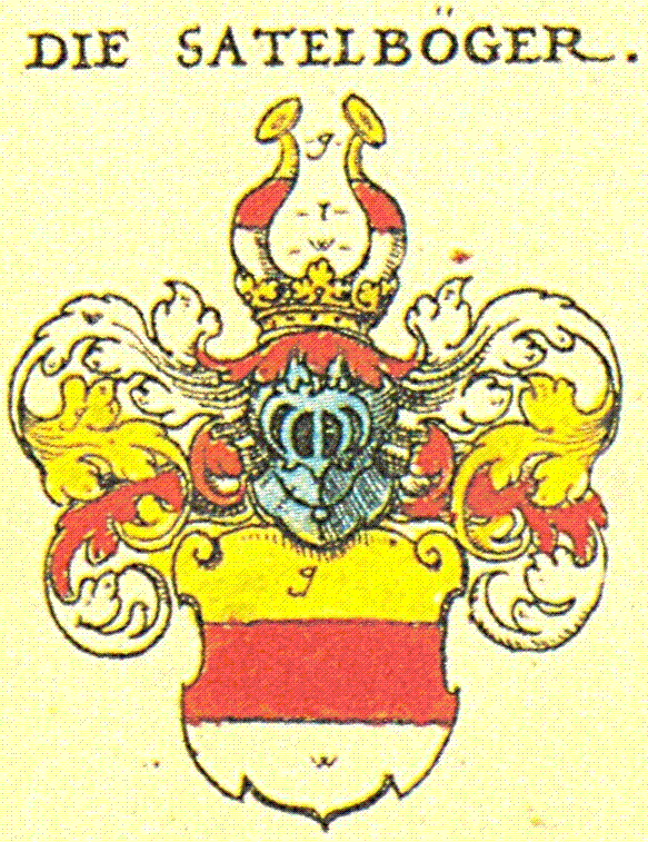 Wappen der Familie von Sattelbogen nach Siebmachers Wappenbuch